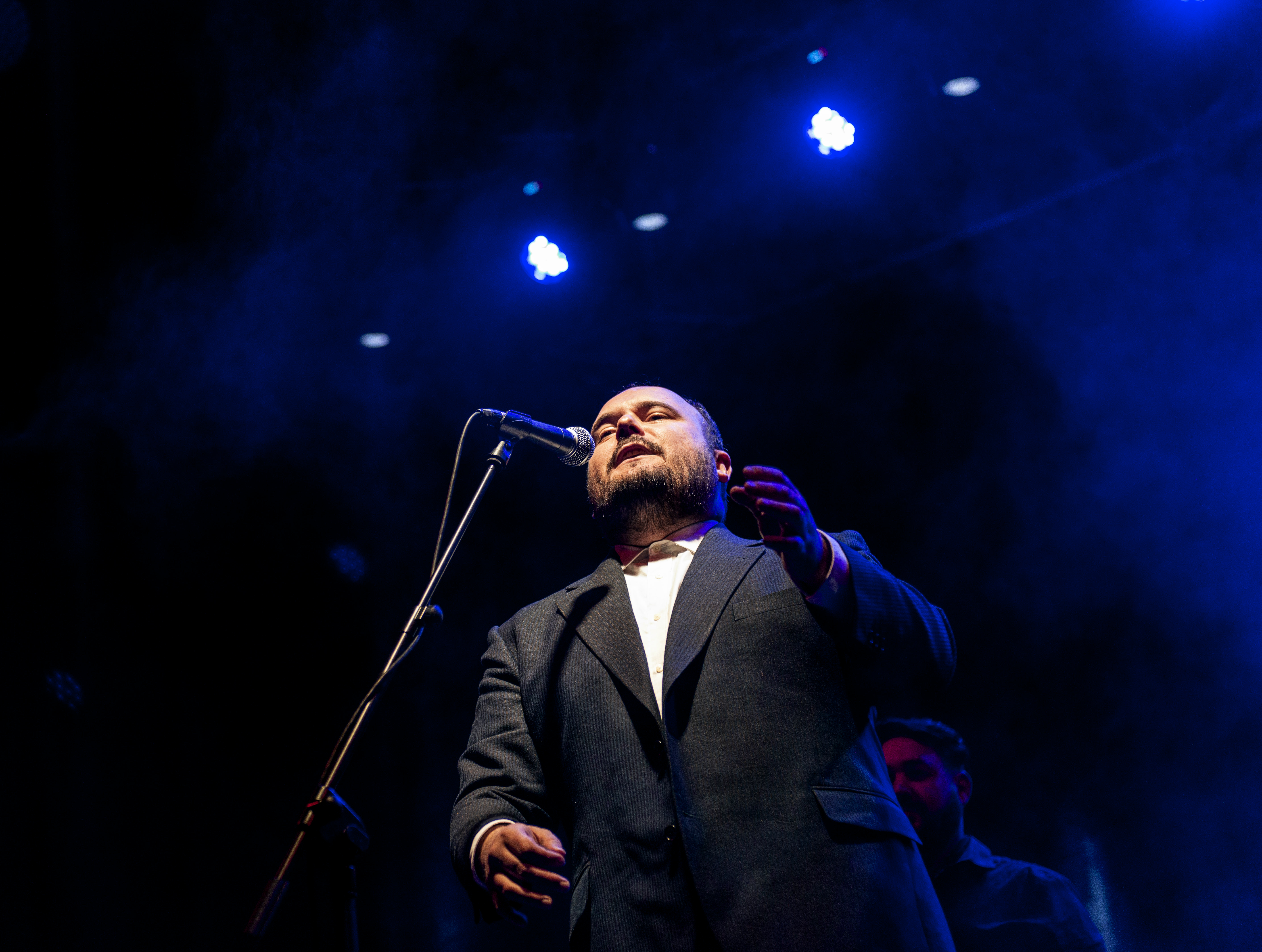 La tarde y la noche de ayer sábado, 12 de mayo, contaron con decenas de propuestas culturales para celebrar las fiestas. En la plaza de Conde de Barajas el atardecer arrancaba con poesía y la música de Tulsa y Abraham Boba. Madrid se preparaba para una noche con músicas de raíz y sus revisiones más contemporáneas, desde el flamenco a la canción africana.